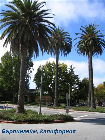 Бърлингейм, Калифорния